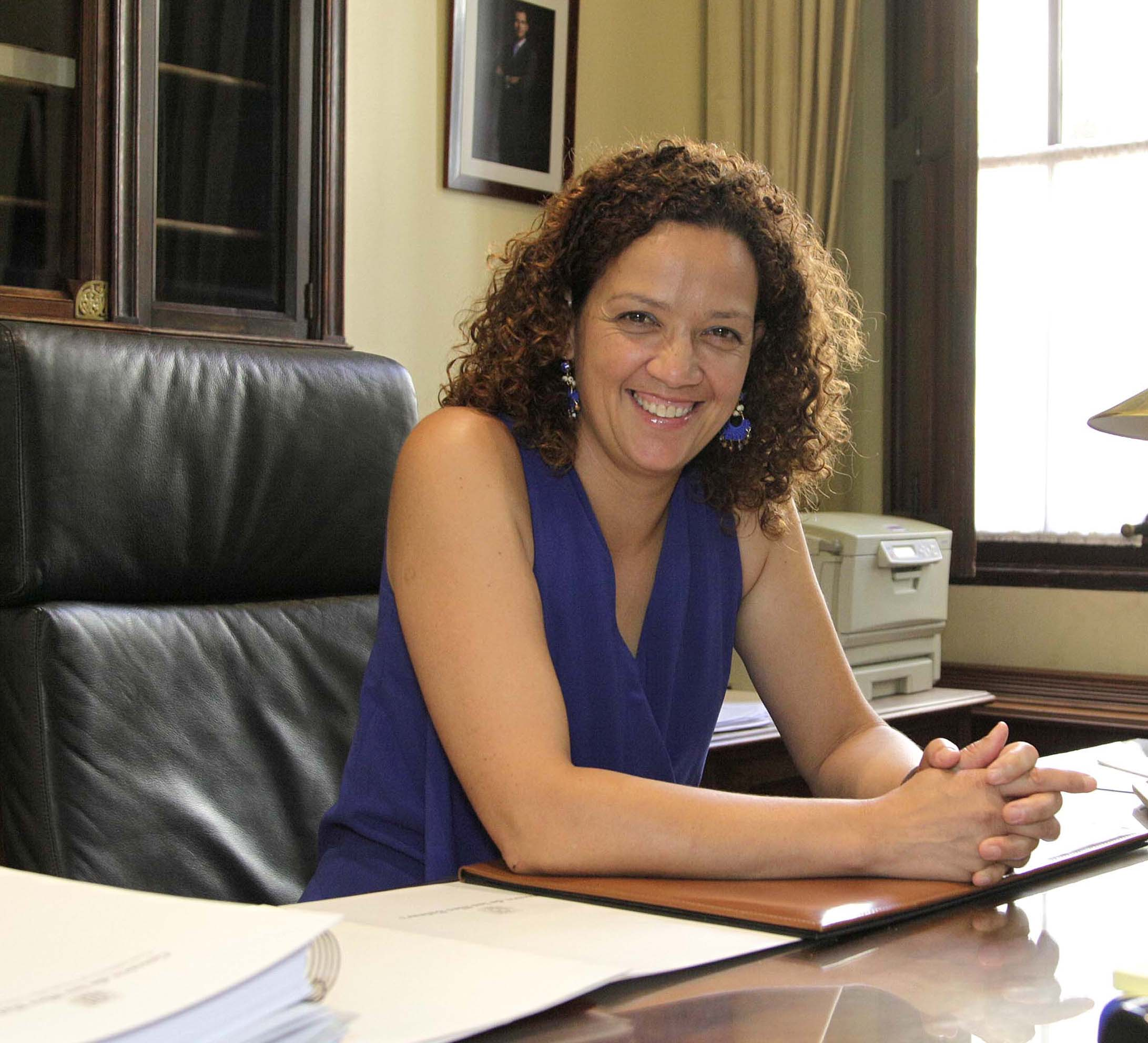 Foto oficial de Catalina Cladera, consellera d'Hisenda i Administracions Públiques